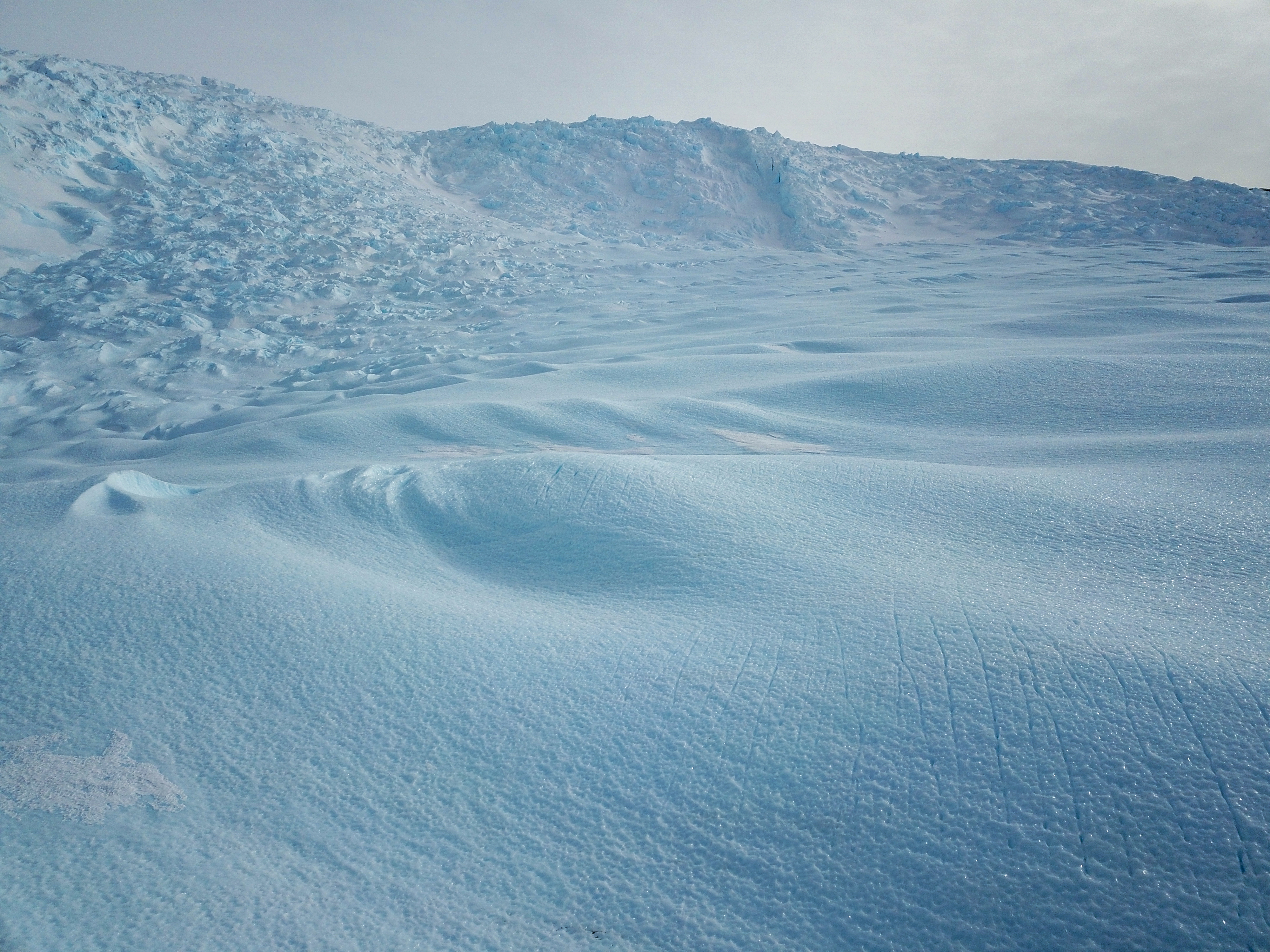 Antarctica